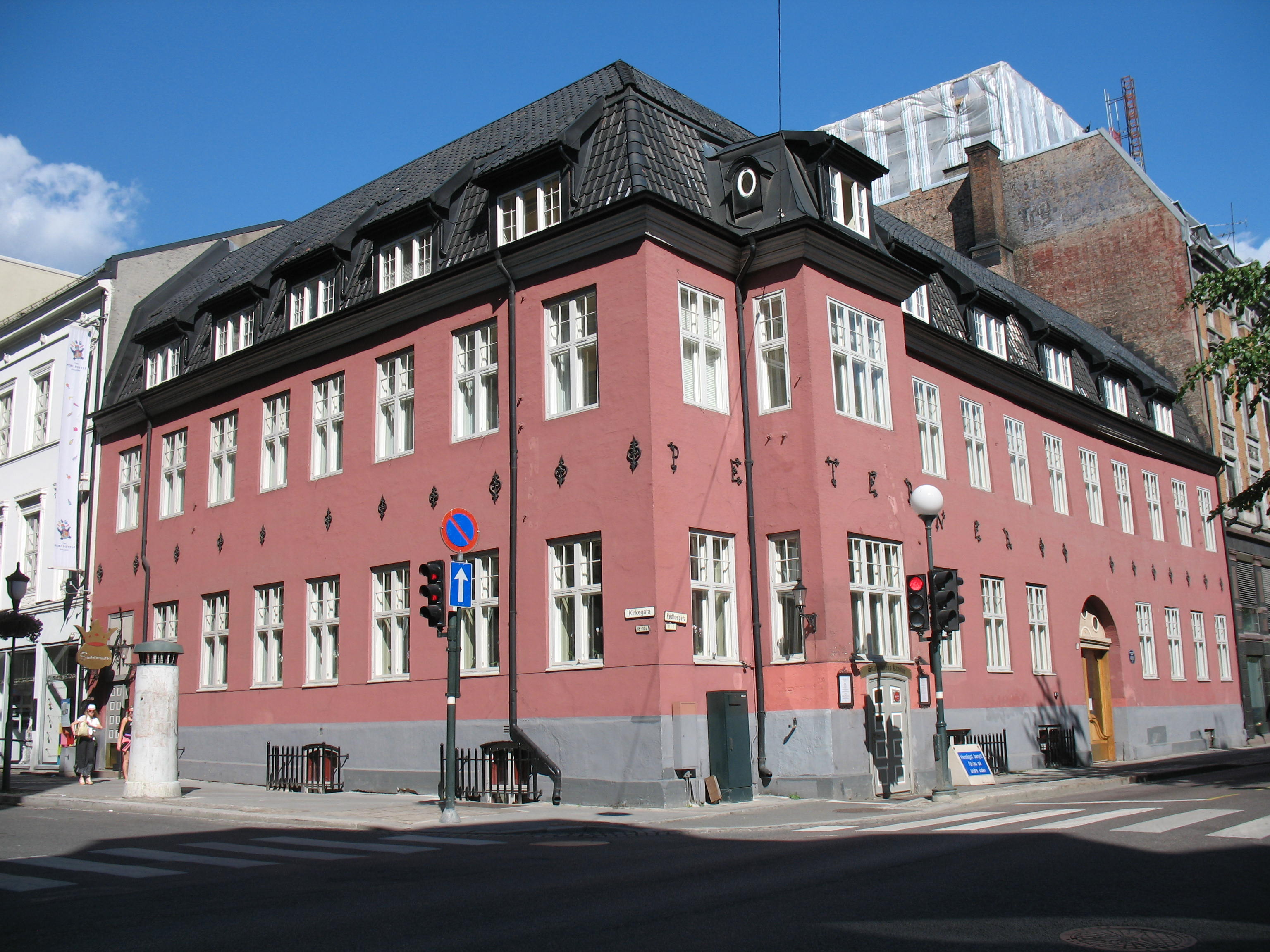 Statholdergaarden i Oslo, på hjørnet av Rådhusgata og Kirkegata